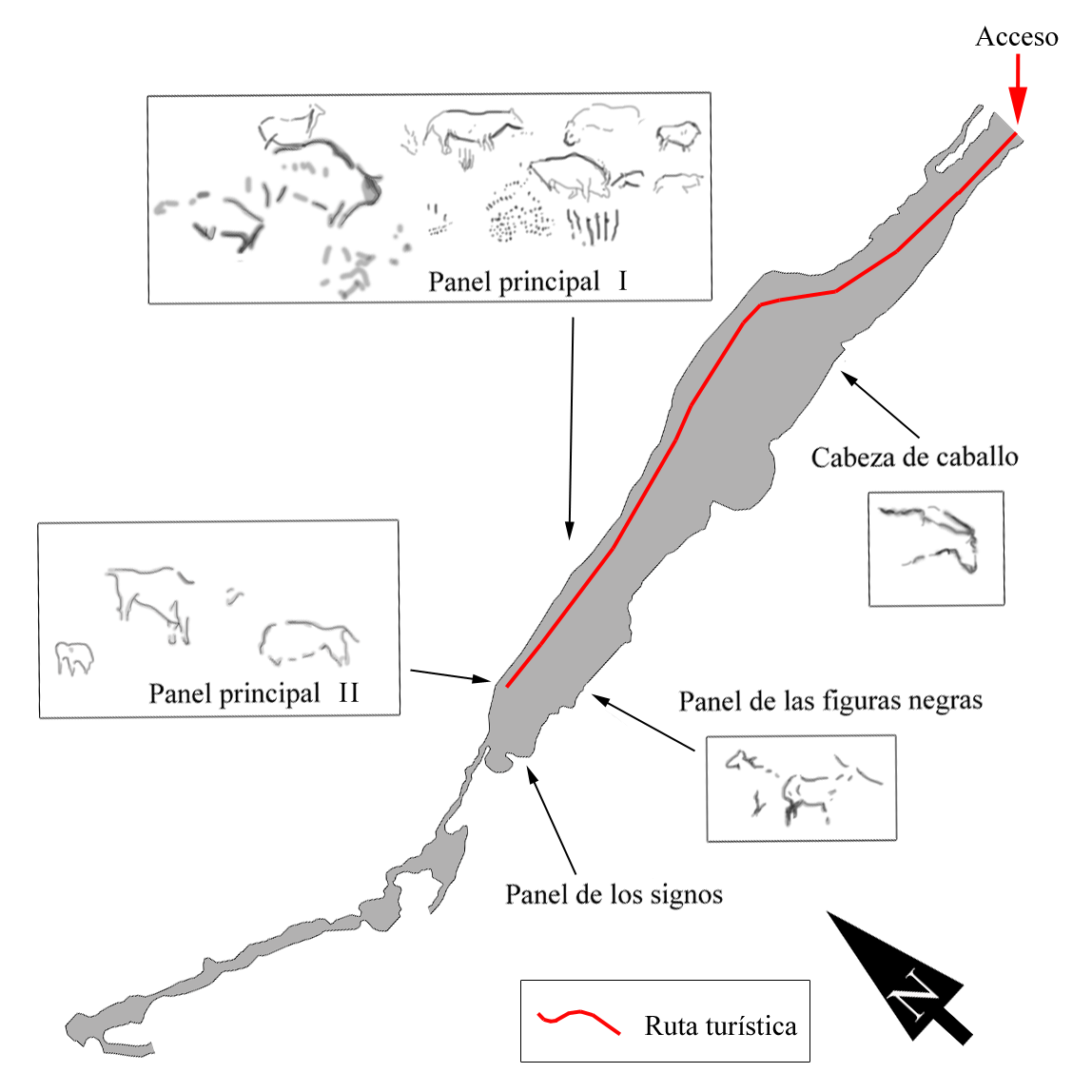 Plano de la cueva del Pindal en Pimiango, Ribadedeva, Asturias